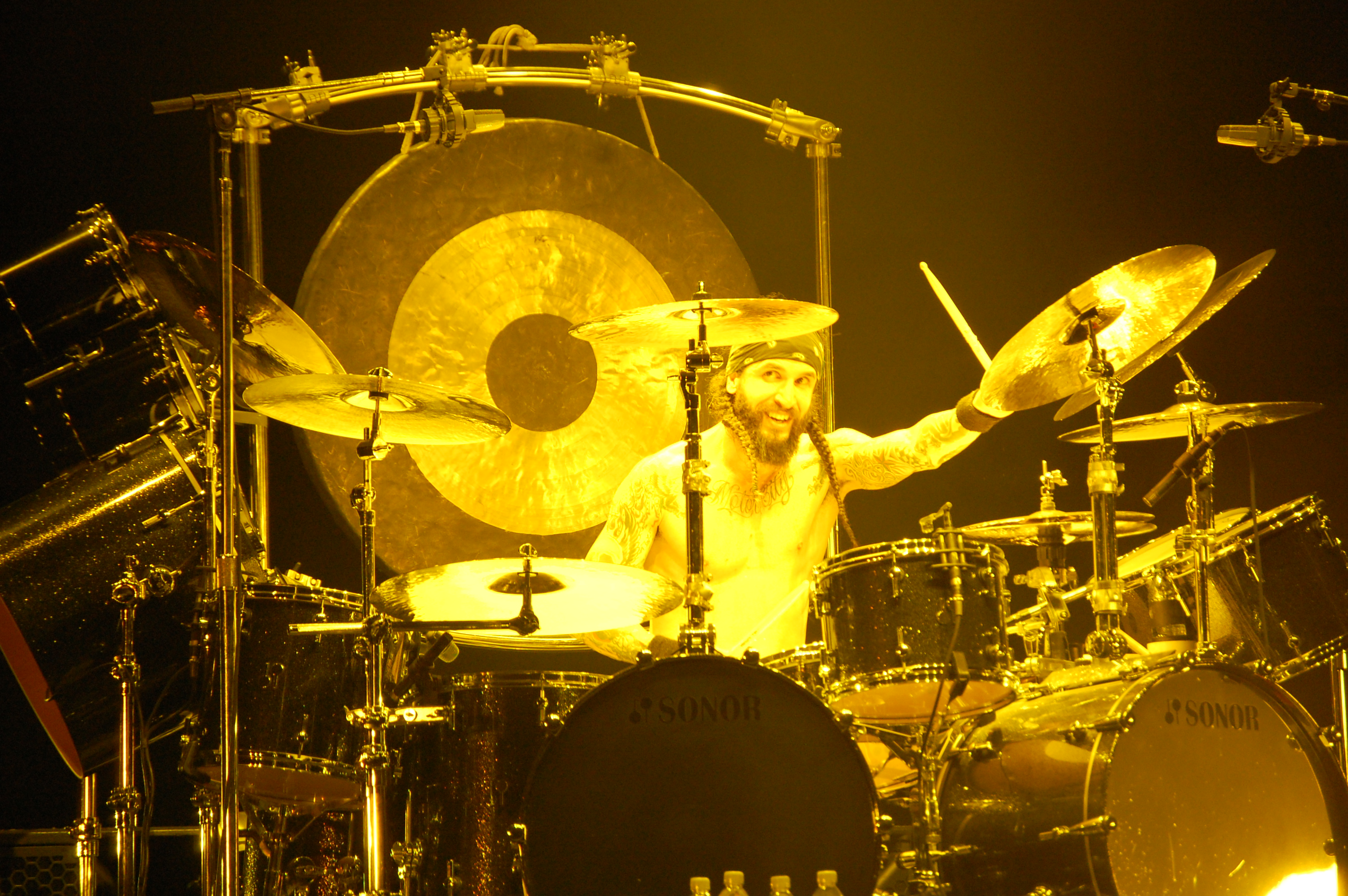 Tommy Clufetos, batería de Ozzy Osbourne, tocando en Chile.